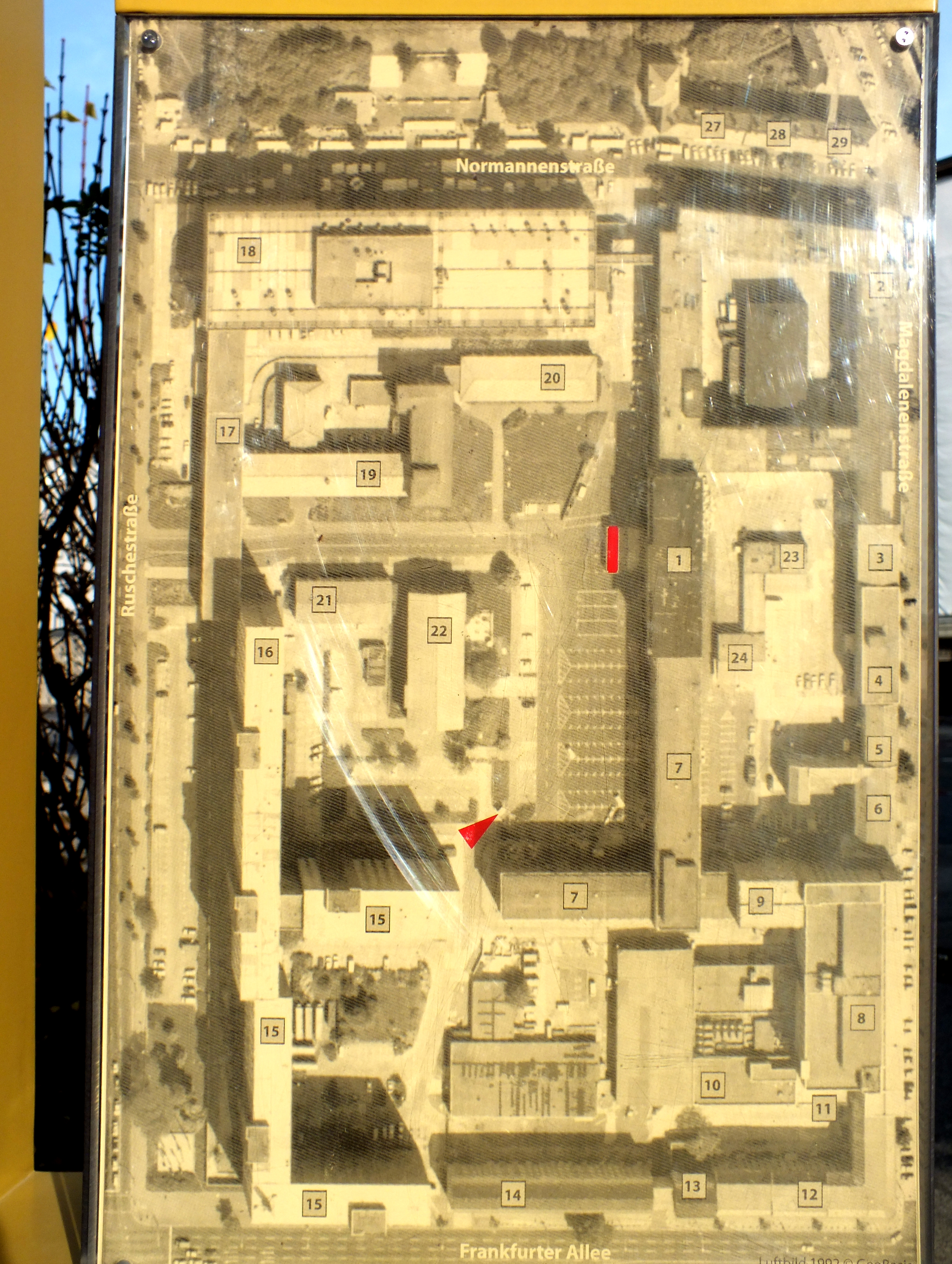 eh. Stasianlage, Übersichtsplan aller Häuser